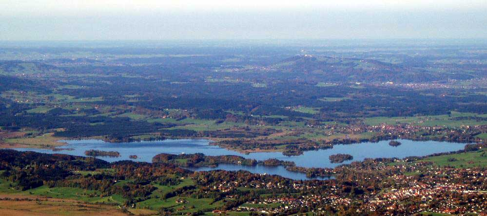 Vogelperspektive auf den Staffelsee: Wörth liegt links von der Mitte